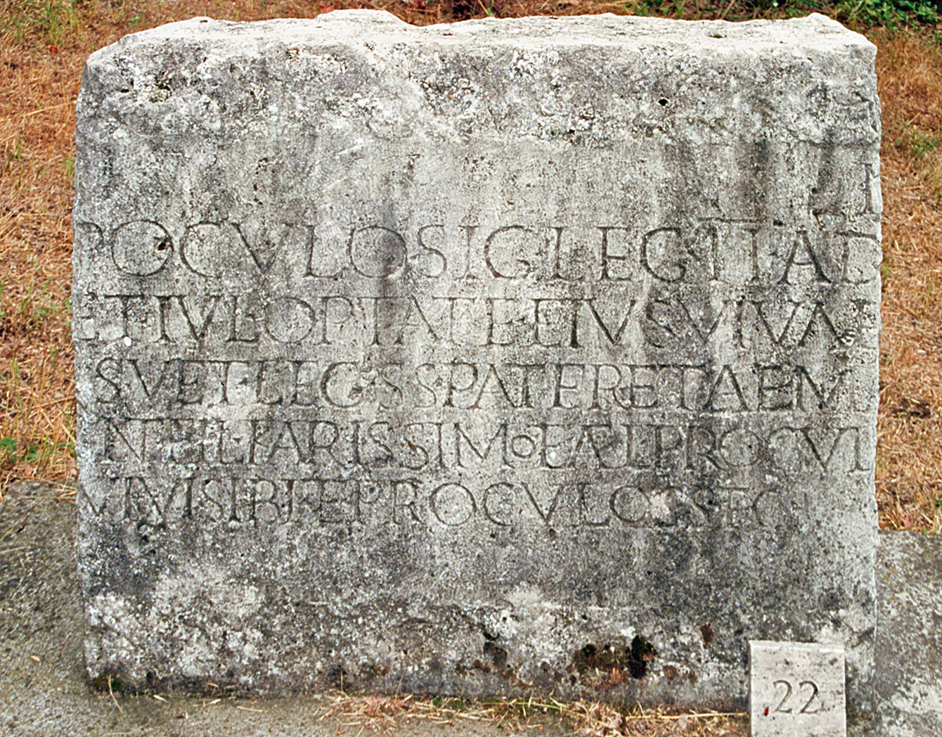 Szentendre (Ulcisia Castra), Ungarn: Grabinschrift des ... Proculus von einem Grabbau aus der Zeit von 170 bis 200 n. Chr. Der Stein wurde sekundär in einem der spätantiken Kastelltürme wiederverwendet und dabei stark zurechtgehauen. Literatur: AE 1947, 00029; RIU 3 Nr. 885.